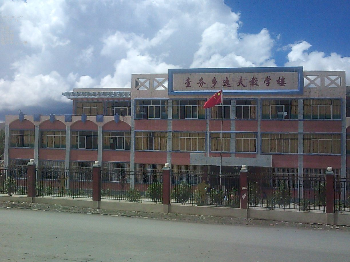 中文（香港）: 西藏 日喀則 拉孜縣 查務鄉 逸夫中心小學